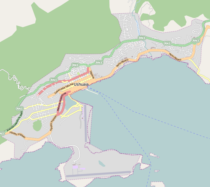 Mapa de Ushuaia